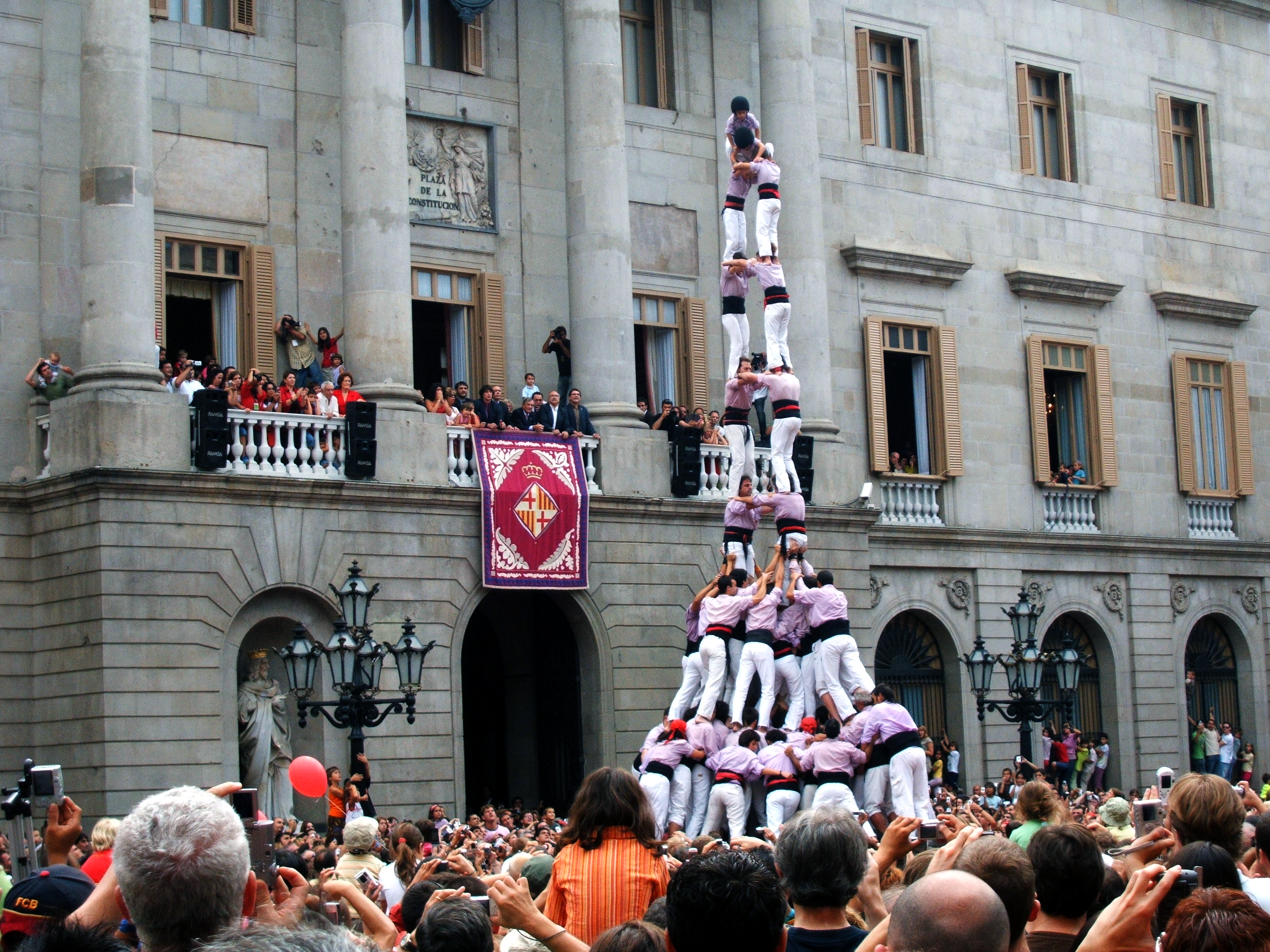 Castell muntat davant ajuntament de Barcelona, plaça Sant Jaume, durant les Festes de la Mercè de la ciutat a l'any 2006. 2de9fm. Torre de 9 amb folre i manilles dels Minyons de Terrassa